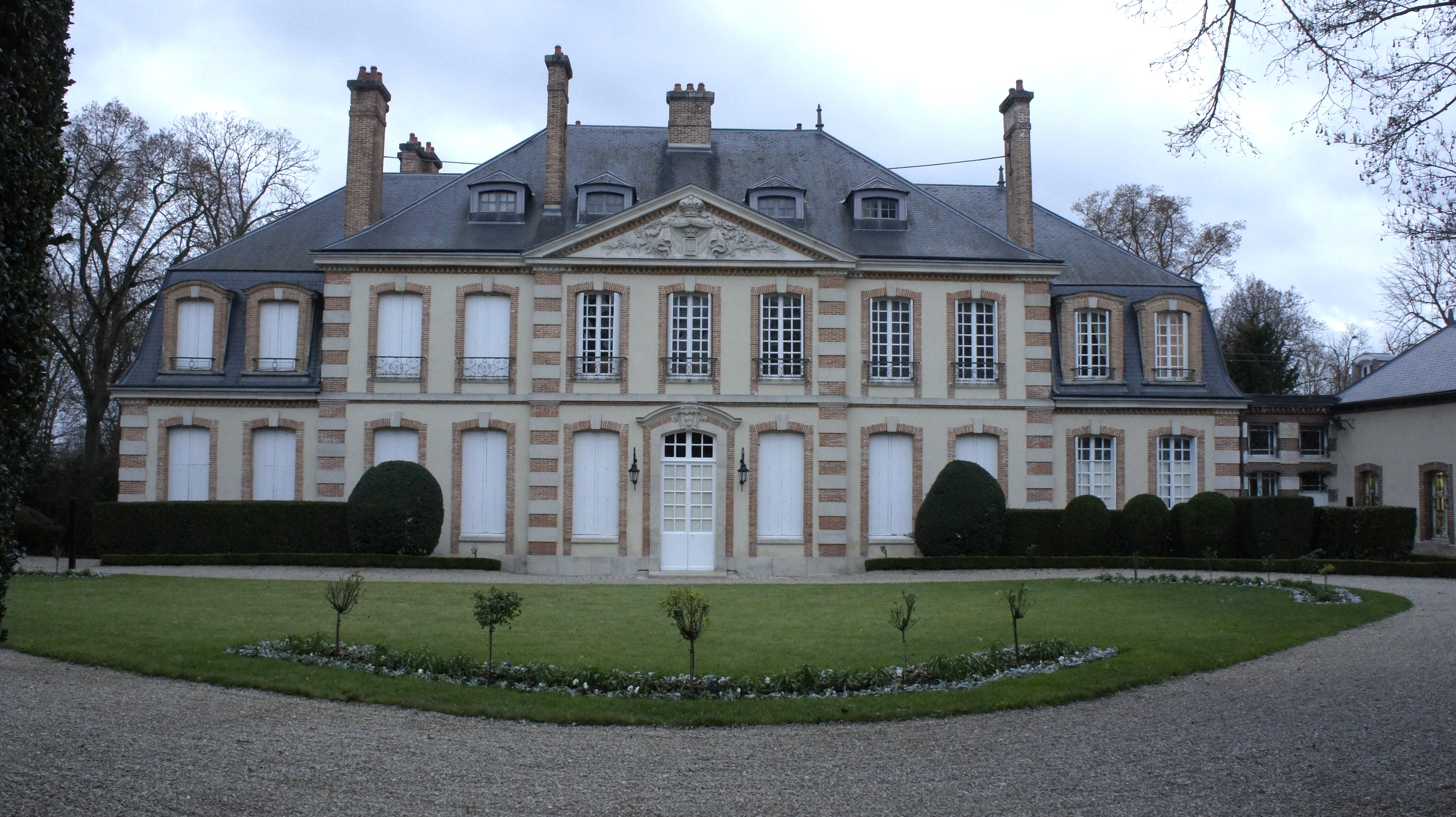 Château de Mareuil façade donant dans le village à Mareuil.